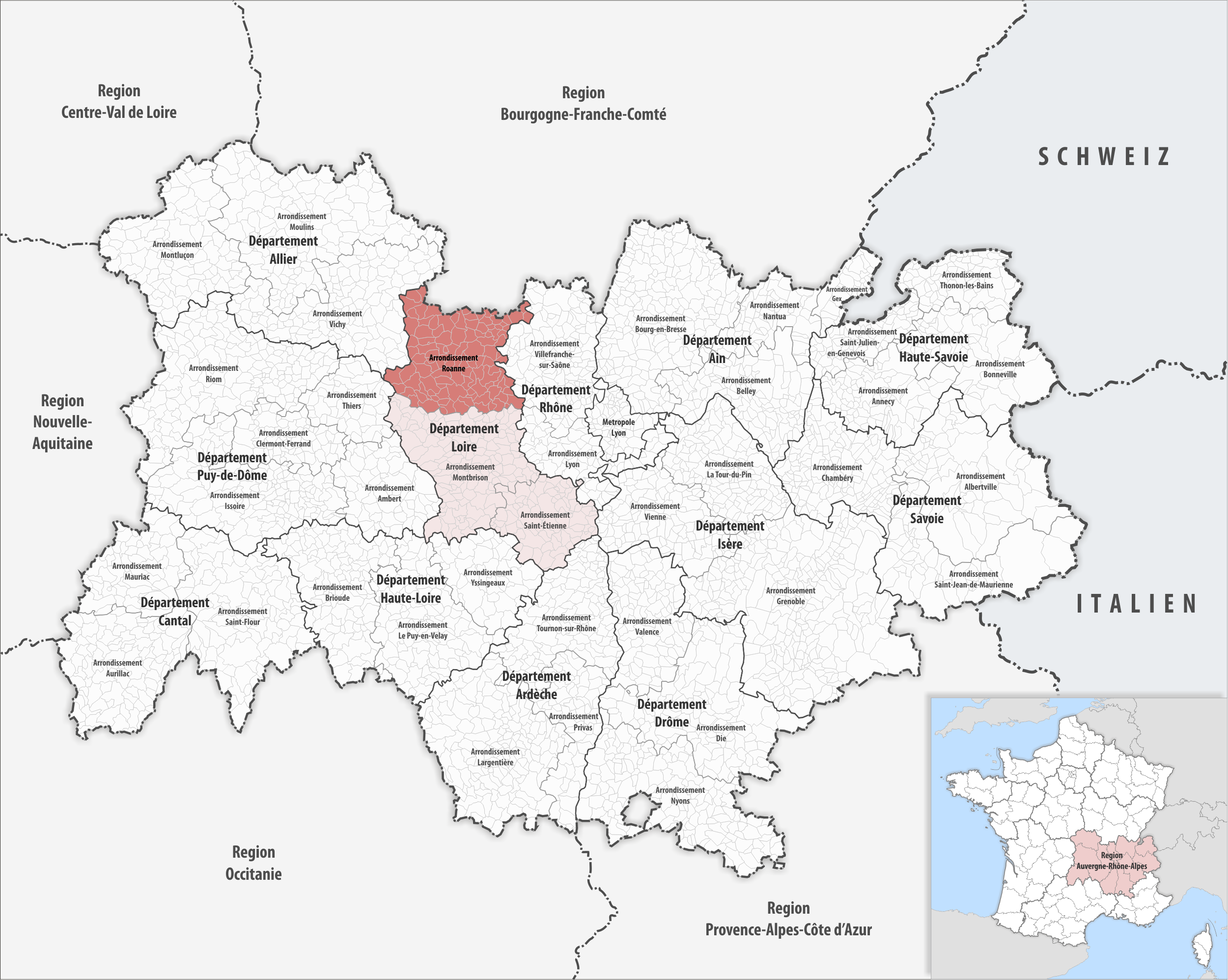 Lage des Arrondissements Roanne